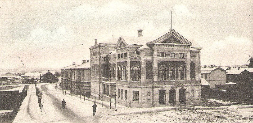 Vykort föreställande Varbergs teater, Varberg, Sverige.